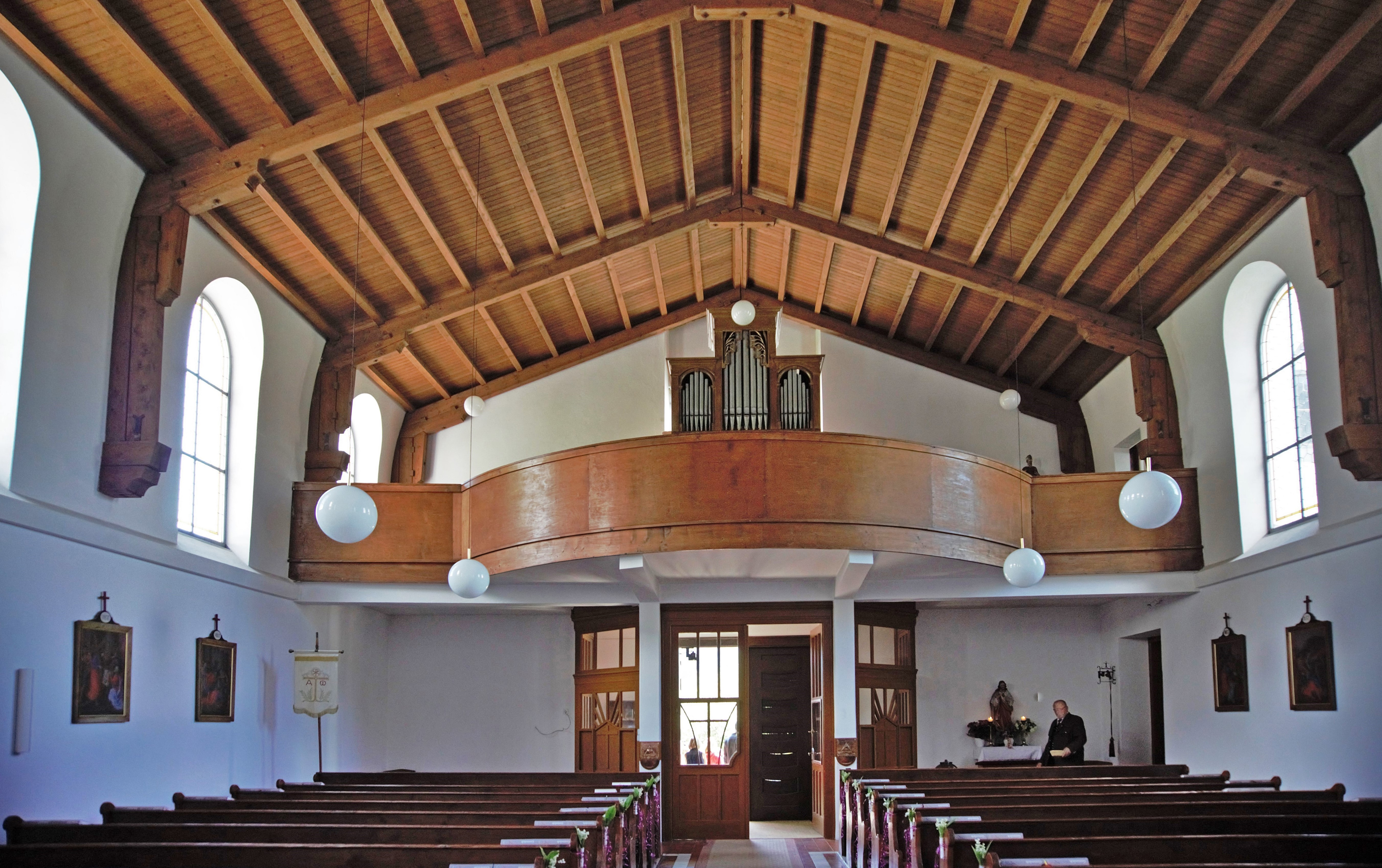 Kath. Pfarrkirche St. Josef in Bodensdorf, Innenansicht gegen die Orgelempore